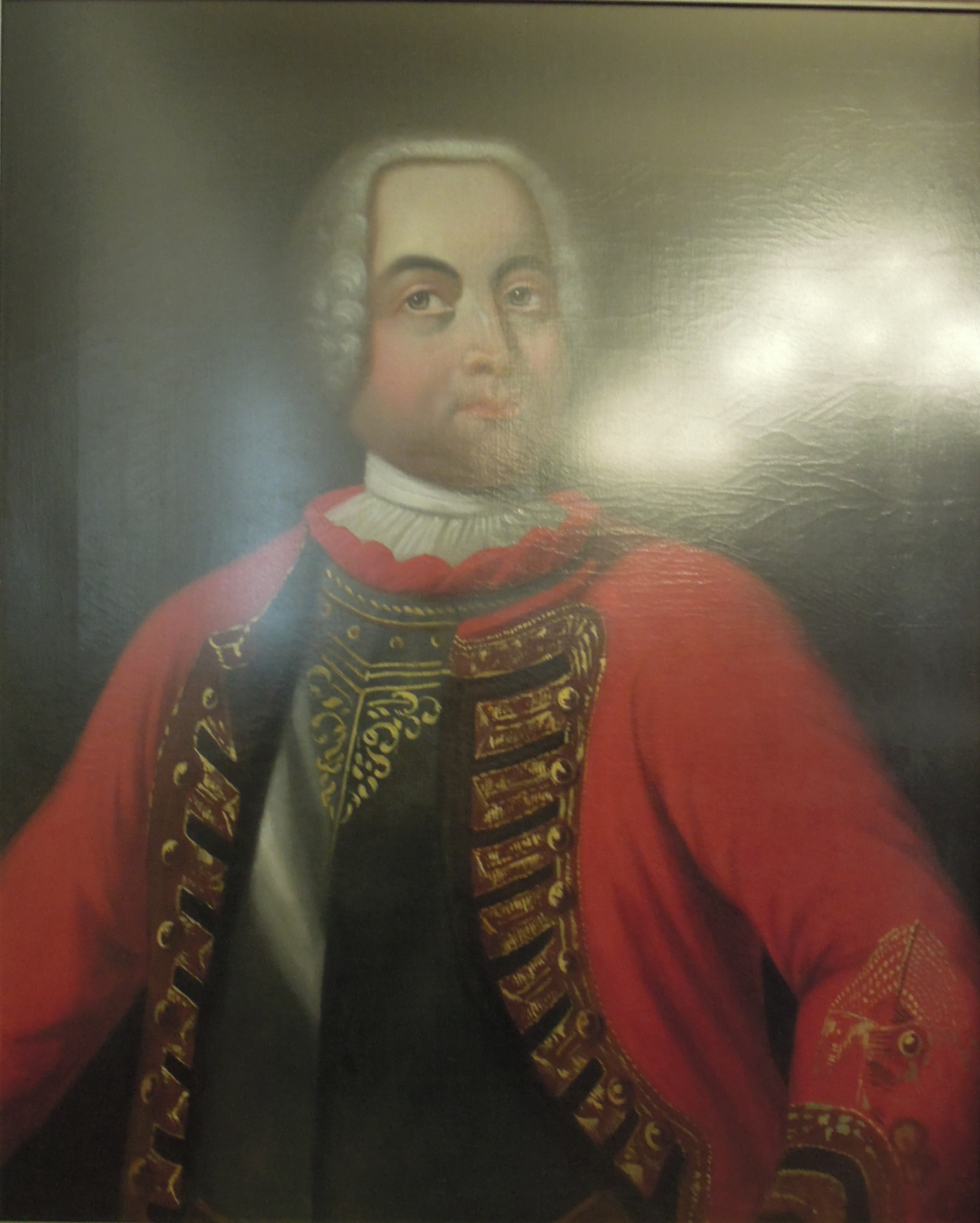 Porträt im Rathaus Stade (1. Etage)